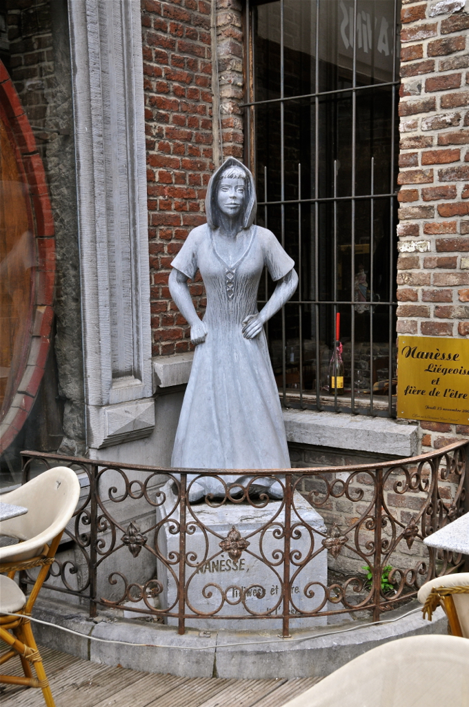 "Nanesse Liégeoise et Fière de L'être". Jeudi 25 novembre 2004. Offert par le Restaurant 'Amon Nanèsse'.